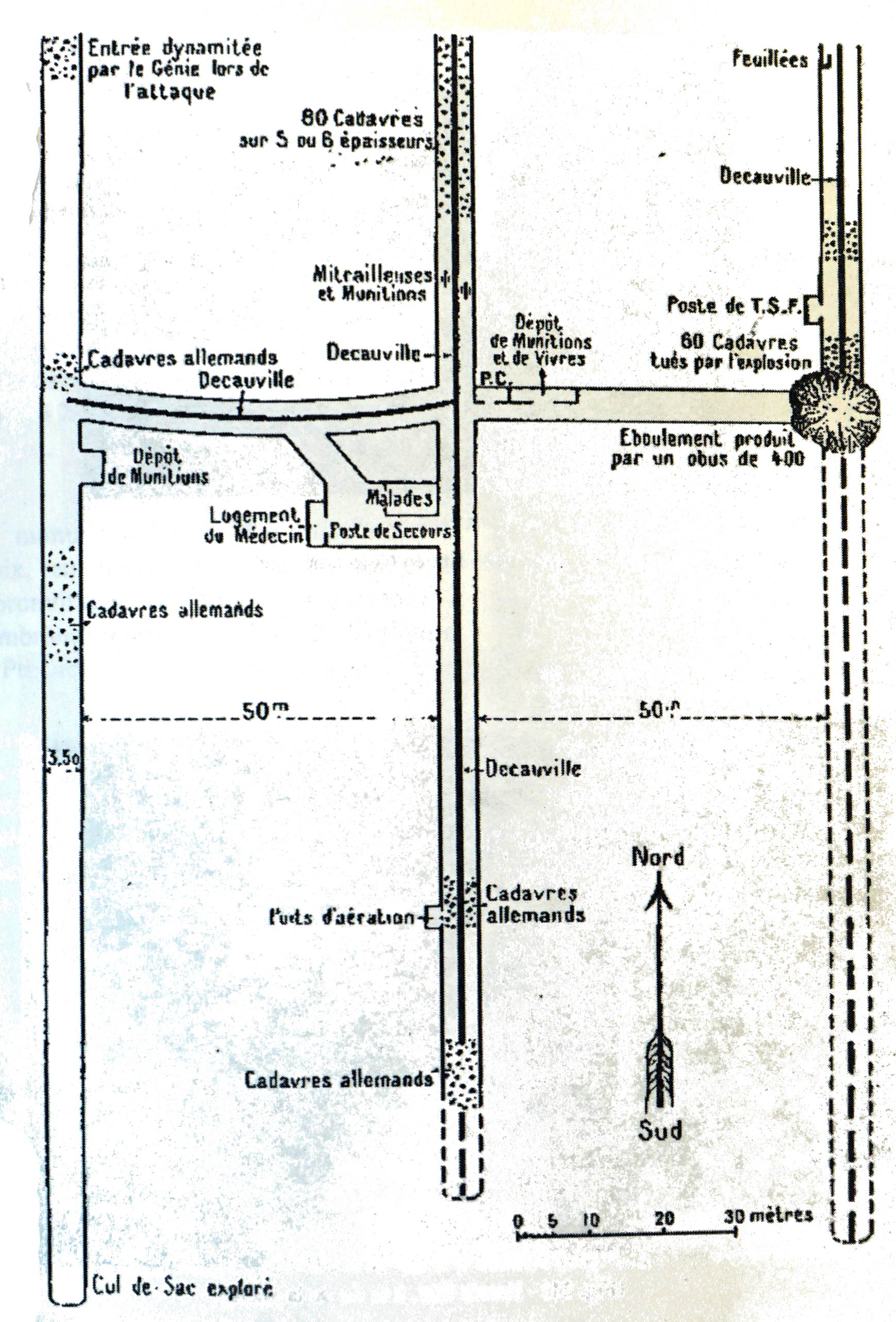 lors de la bataille des monts de champagne.